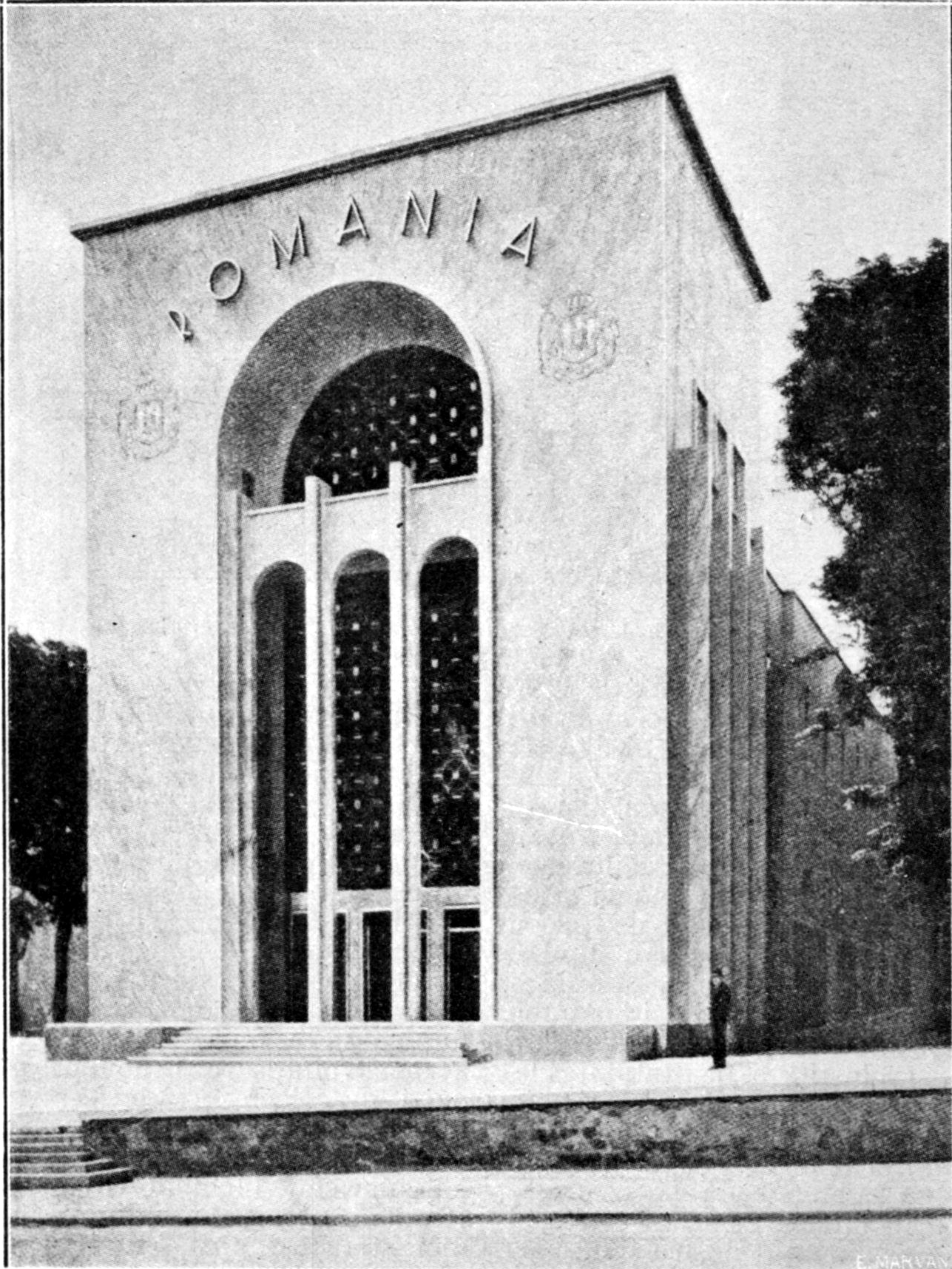 Pavilionul Romaniei la Expoziția Internaționala de la Paris din anul 1937